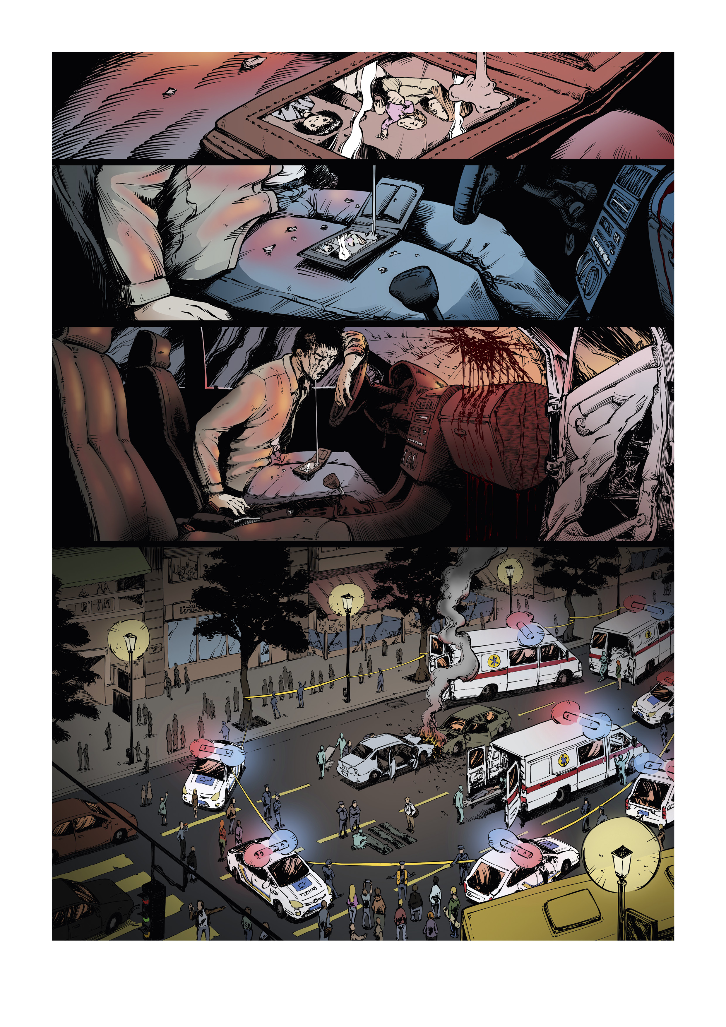 Випуск 5